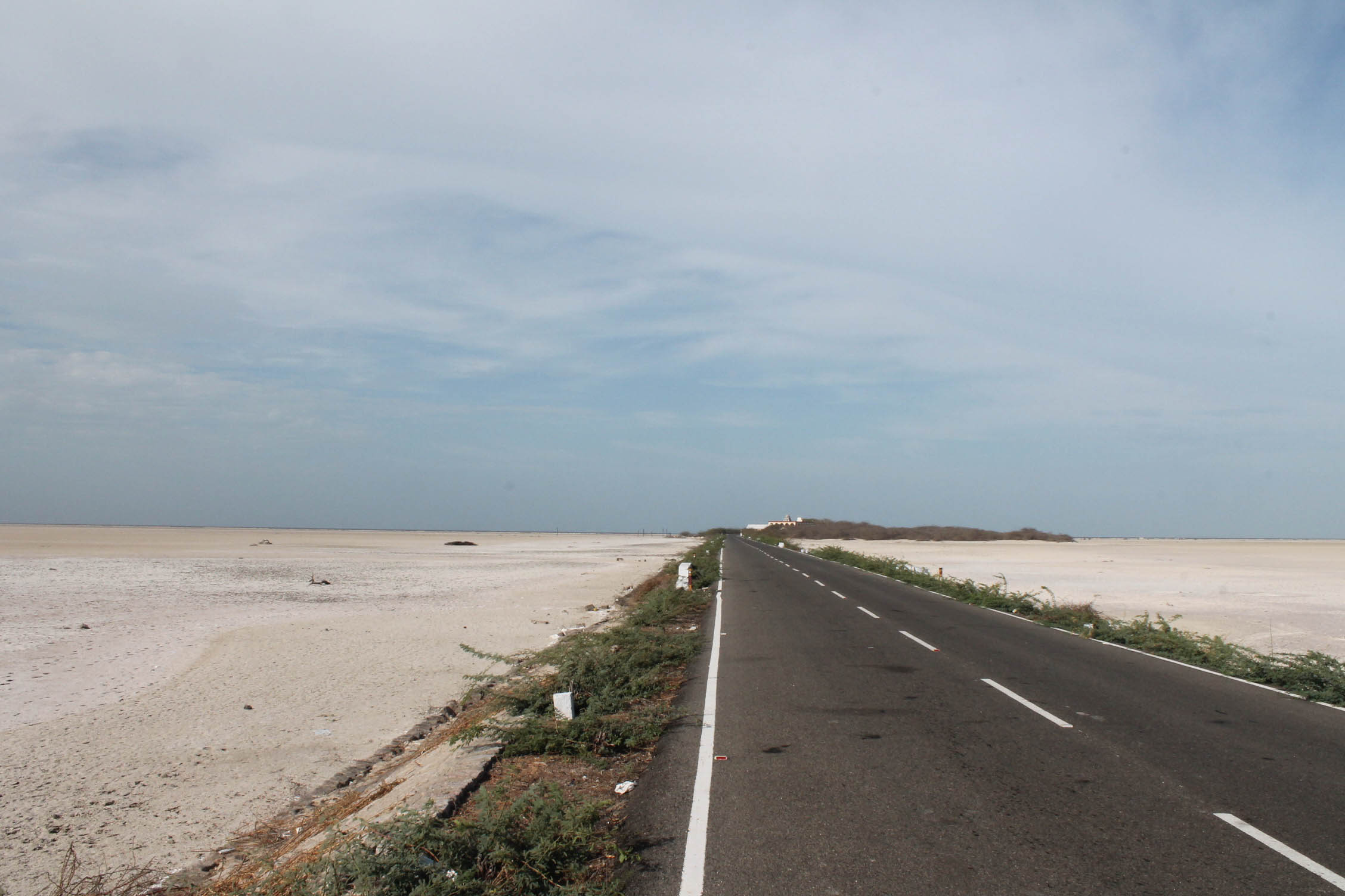 കോതണ്ഡരാമക്ഷേത്രം